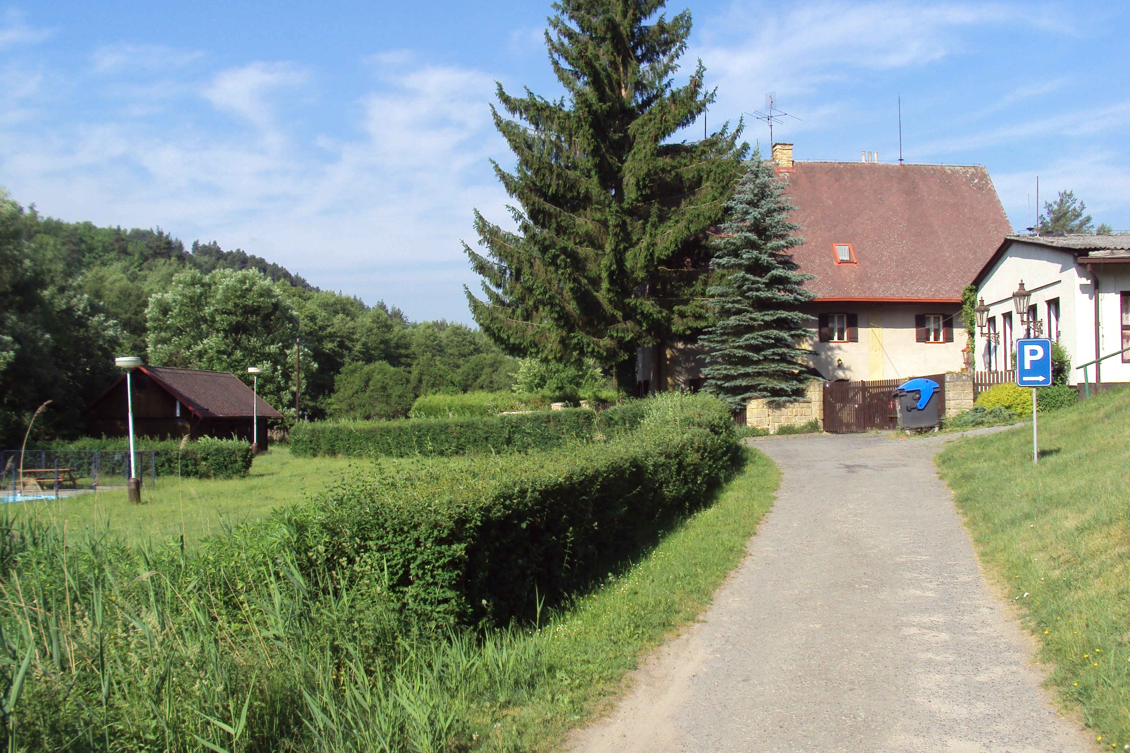 Osada Vrabcov na Kokořínsku spadá pod obec Deštná a ta pod Dubou